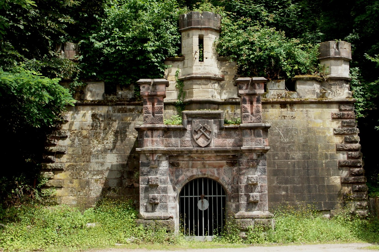 Eingang zum ehemaligen Bierkeller beim Schlafhaus der früheren Grube Von der Heydt